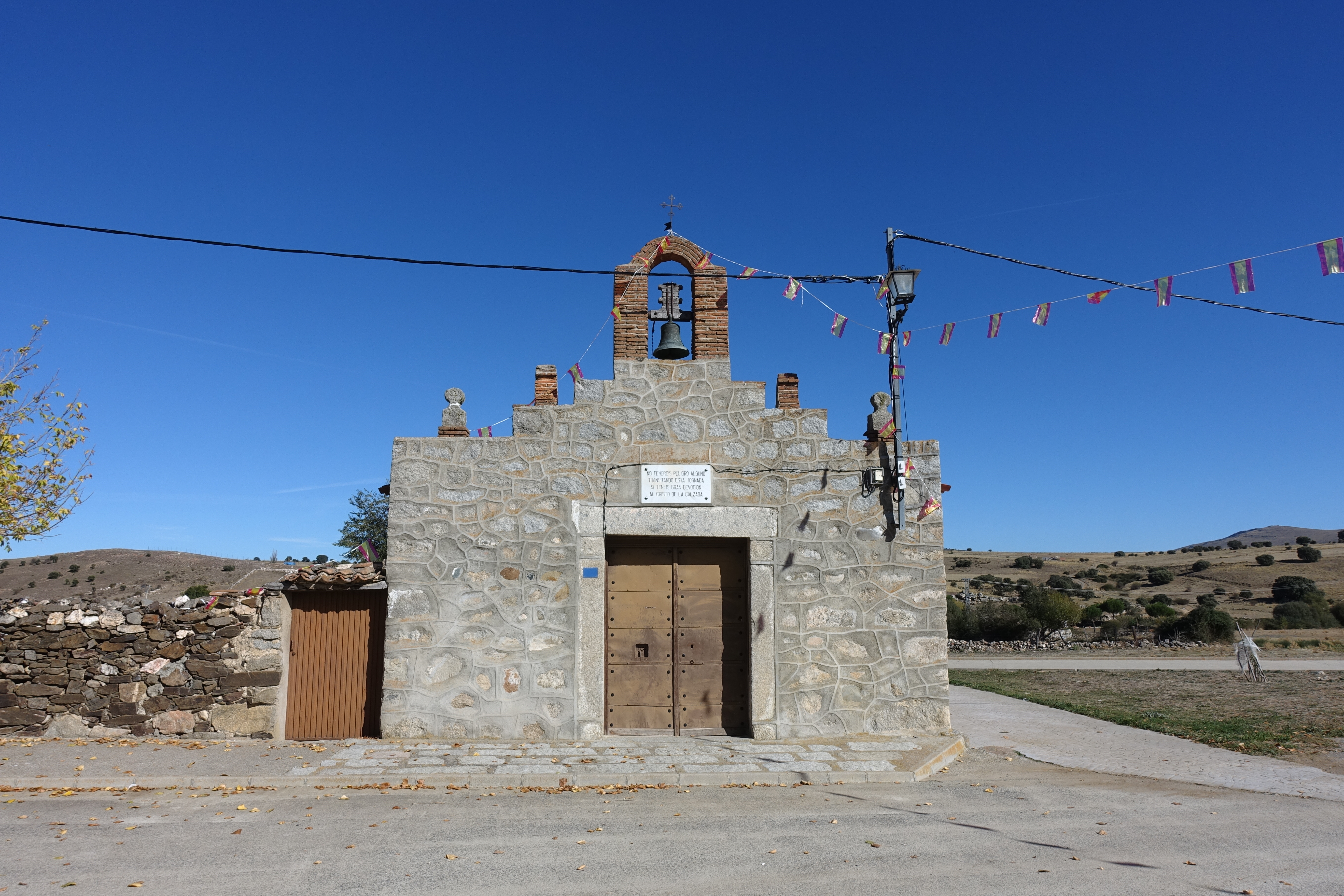 Ermita del Cristo de la Calzada, en Mediana de Voltoya (Ávila, España).